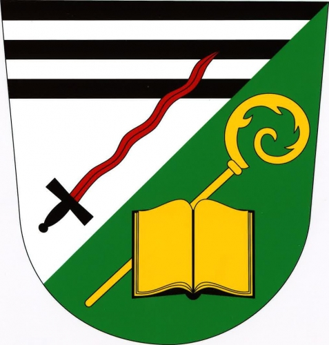 znak, Medlice, okres Znojmo